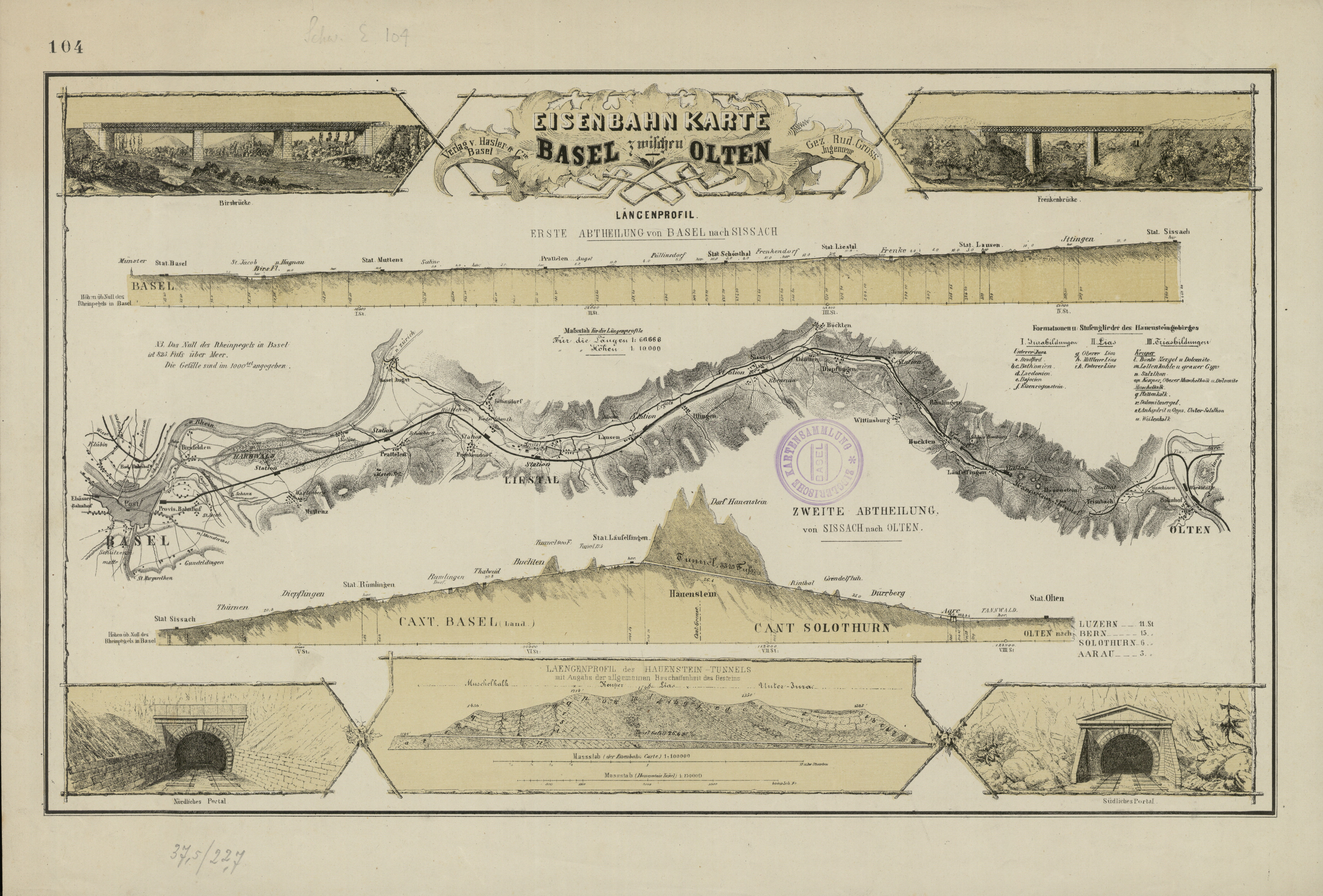 Eisenbahnkarte zwischen Basel-Olten [1:100000] 2 Längenprofile: "Basel-Sisach" - "Sissach-Olten" [Längenmassstab: 1:66 666, Höhenmassstab 1:10 000] Mit 4 Abbildungen von Brücken und Tunnels sowie einem Längenprofil des Hauenstein-Tunnels